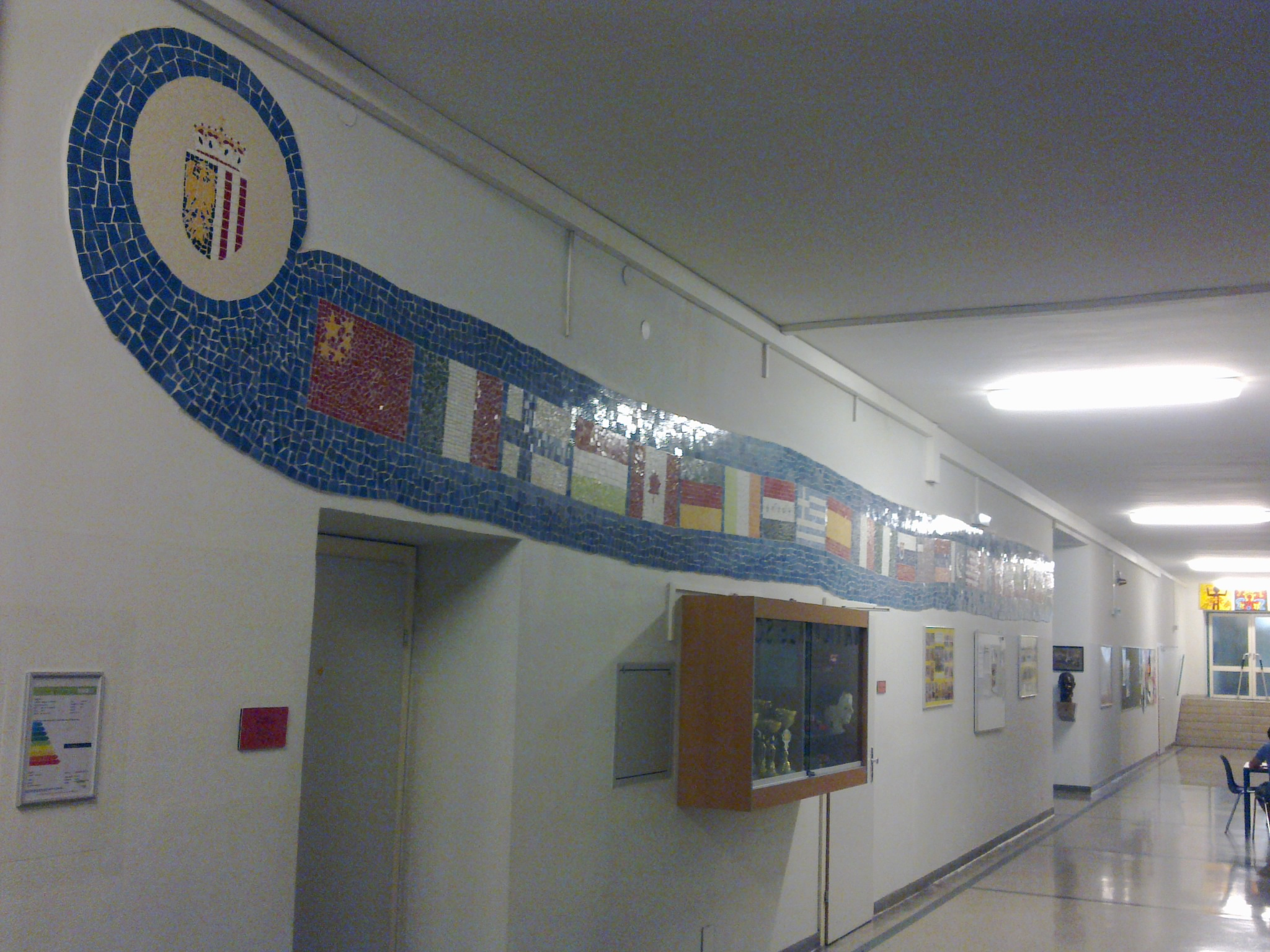 Mosaik "We are the World" gestaltet von SchülerInnen der NMS5 und dem Künstler Mamadou Alimou. Dieses Foto zeigt das linke Ende des Mosaiks.